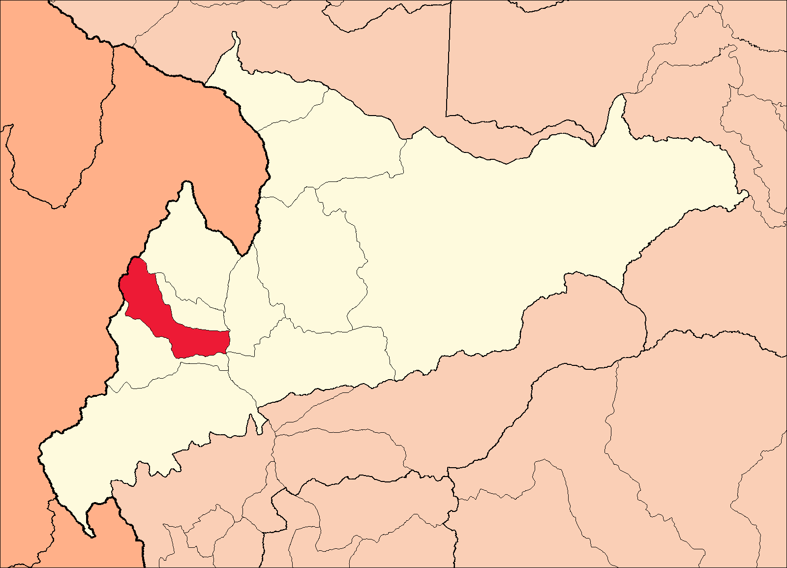 Área del distrito de Miraflores dentro de la provincia de Huamalíes.